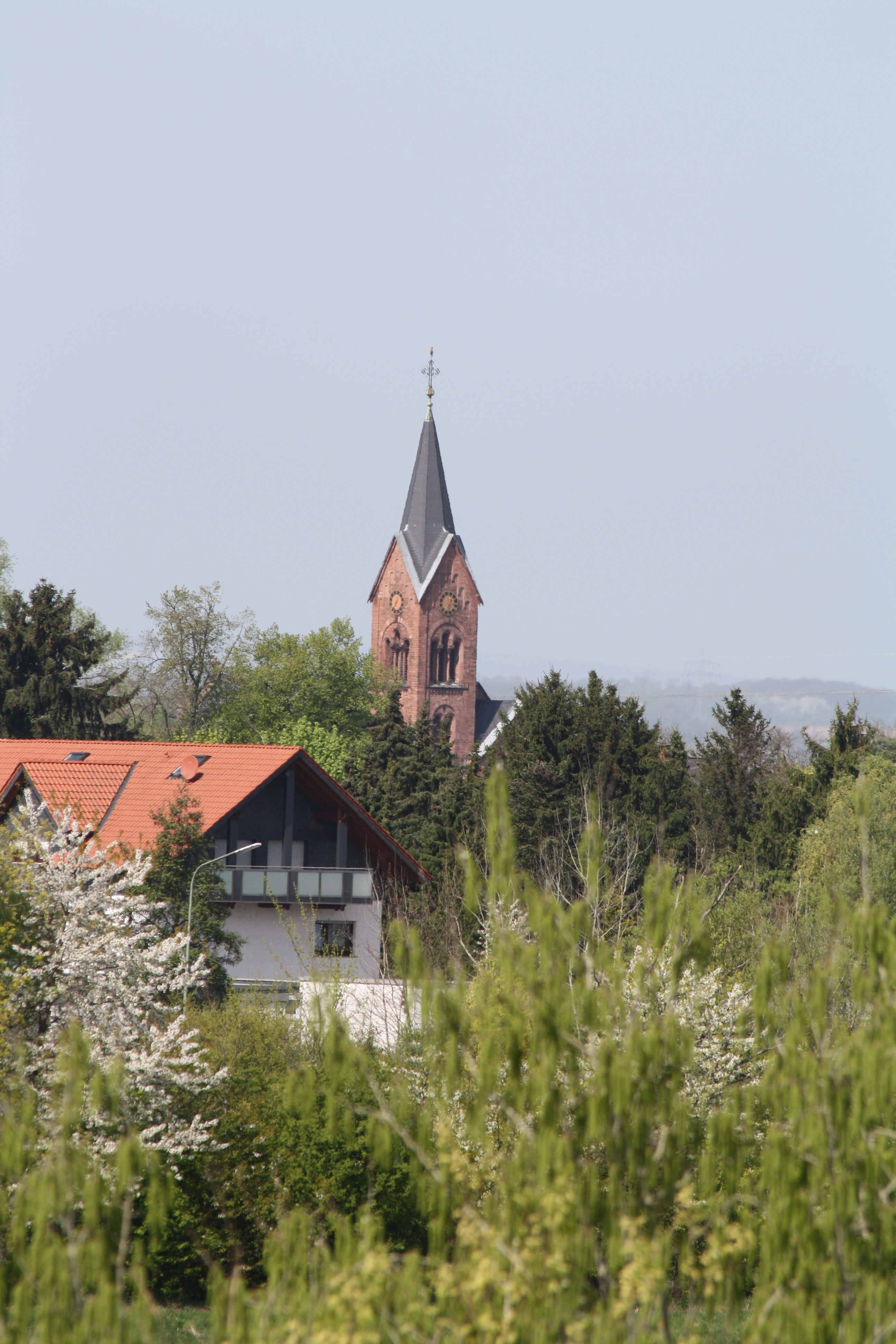 Großkrotzenburg am Main, Kirchturm